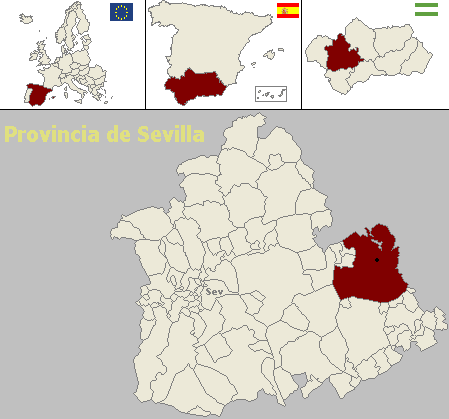 Situación del municipio de Écija (Sevilla)